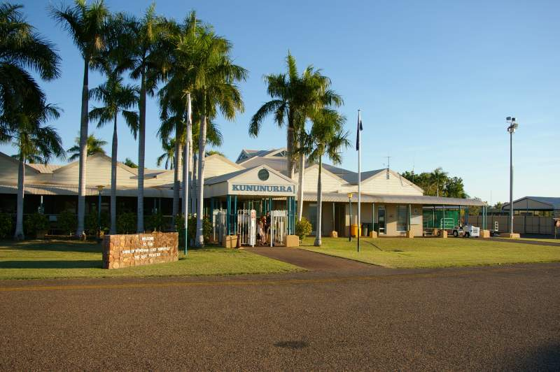 Kununurra Airport. Kununurra, Western Australia